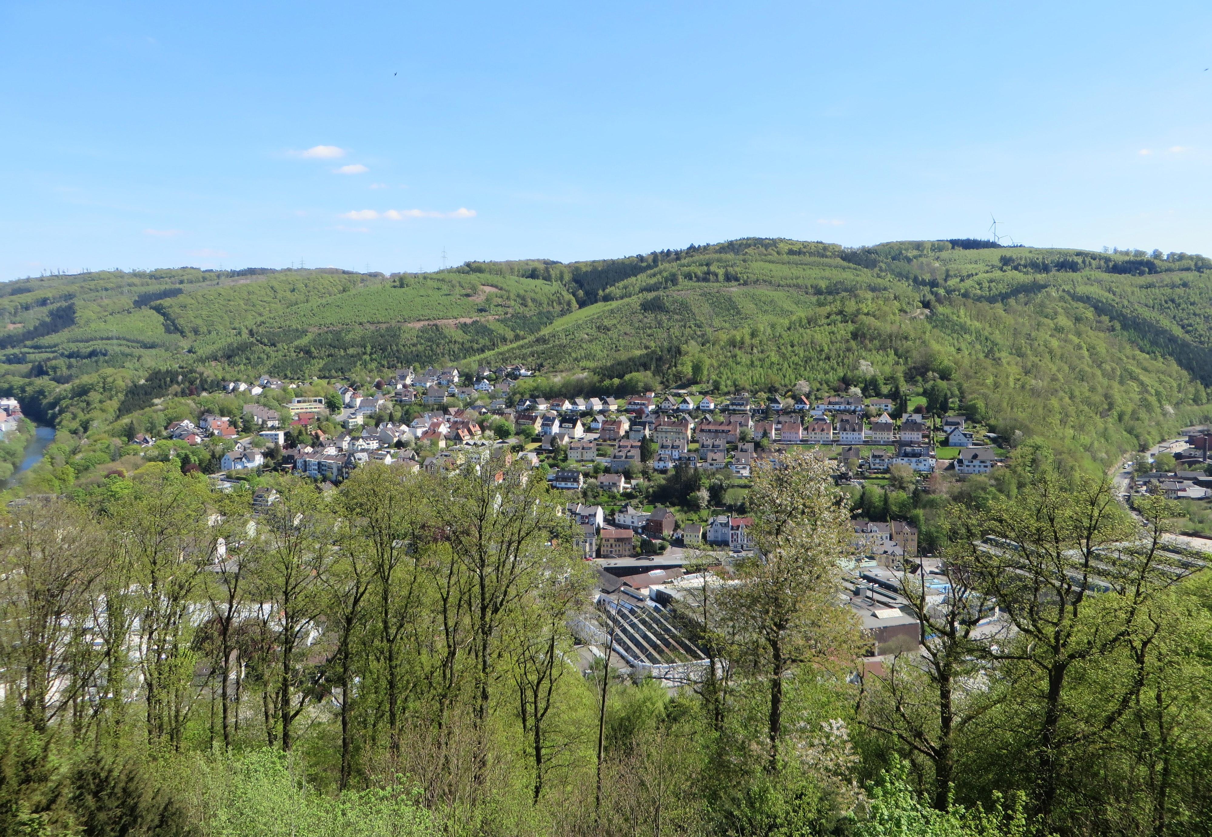 Blick von Schloss Hohenlimburg auf das Nahmertal im Hagener Stadtteil Hohenlimburg. Im Tal sieht man das Kaltwalzwerk C.D. Wälzholz, oberhalb der Häuser von „Bergholz“ und „Am Roten Stein“, das Landschaftsschutzgebiet „Roter Stein, Zimmerberg“. Das große Waldgebiet mit wertvollem Baumbestand, östlich des Nahmertals, zwischen Lenne (links) und Lahmen Hasen, ist mit zahlreichen Bächen durchzogen. Höchste Erhebungen: Zimmerberg (320 m) und Roter Stein (271 m).